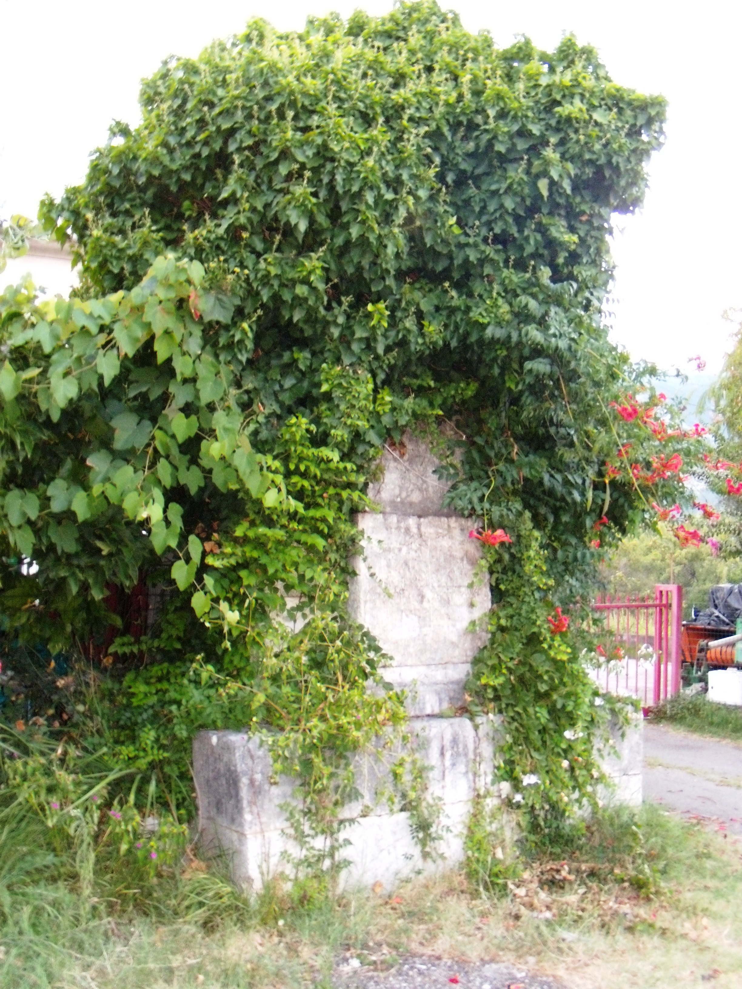 Epitaffio al Re Ferdinando II delle Due Sicilie in memoria della sua visita a Solopaca, Massa di Faicchio e Cerreto Sannita nel 1852.